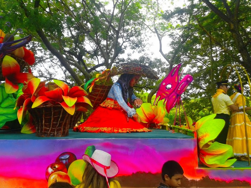 Fiestas de San Pedro, Neiva, Huila. Esta fotografía fue tomada en el municipio colombiano con código 41001.